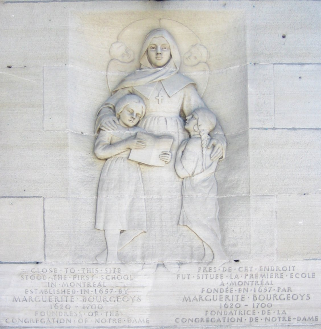 Relief qui représente Marguerite Bourgeoys avec des écolières, rue Le Royer